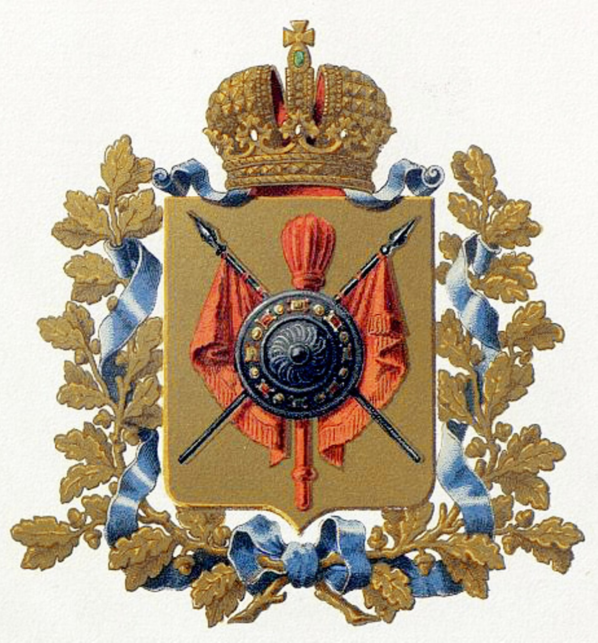 Official Russian Empire coat of arms Tobolsk Governorate. Герб Российской Империи Тобольской губернии в Гербовнике Бенке. Утверждён Императором Всероссийским Александром Вторым.